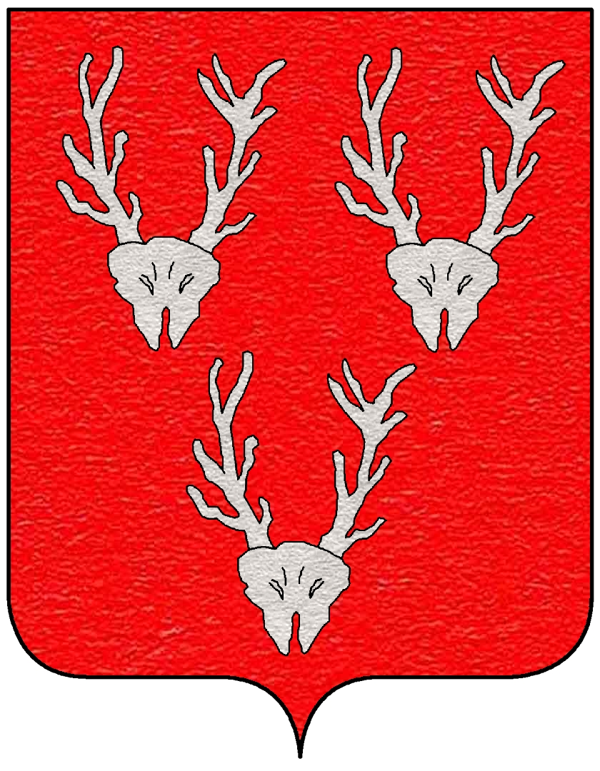 Stemma della famiglia Soderini (Firenze), un ramo della quale fu ammesso anche al patriziato di Venezia.